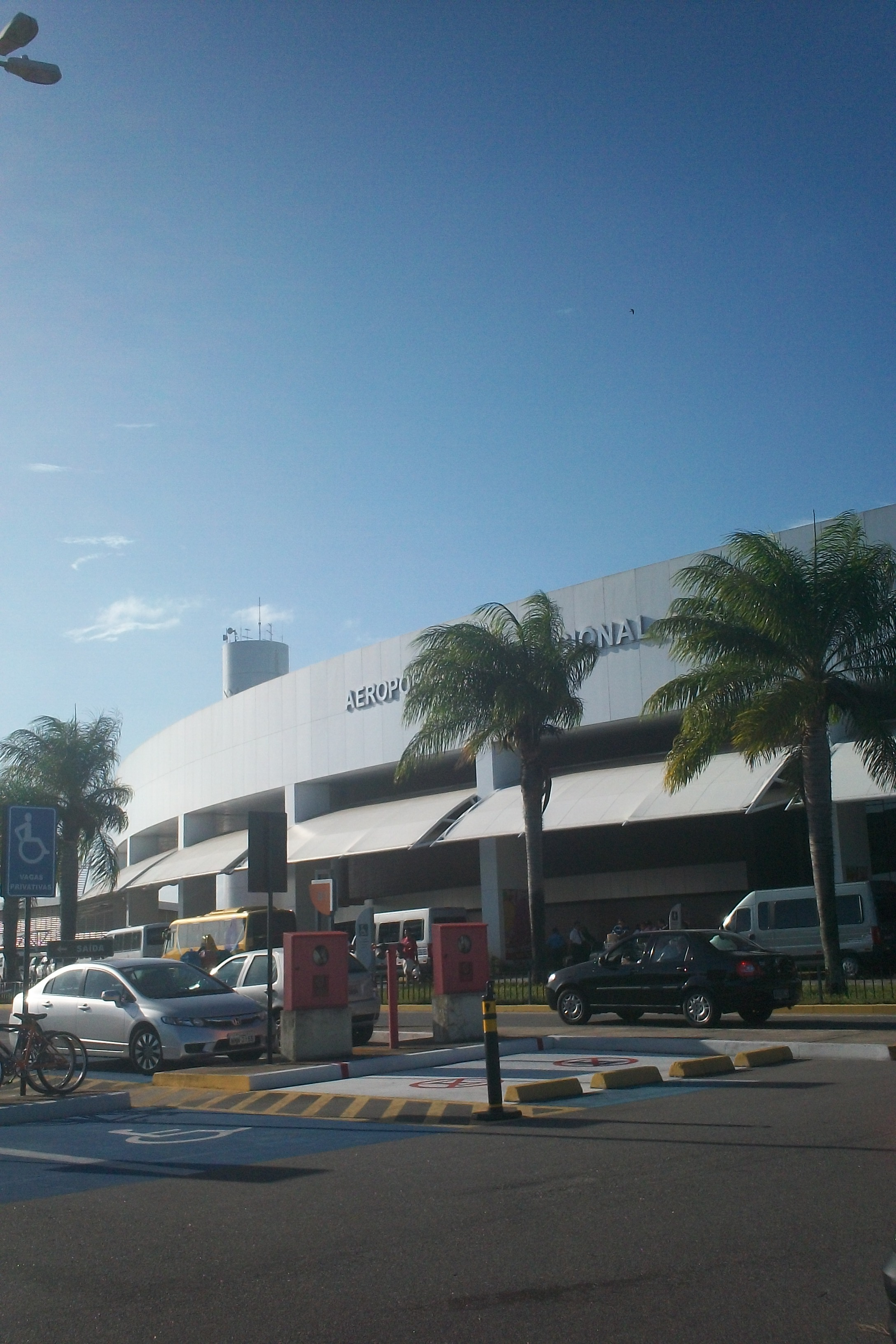 Aeropuerto Zumbi dos Palmares